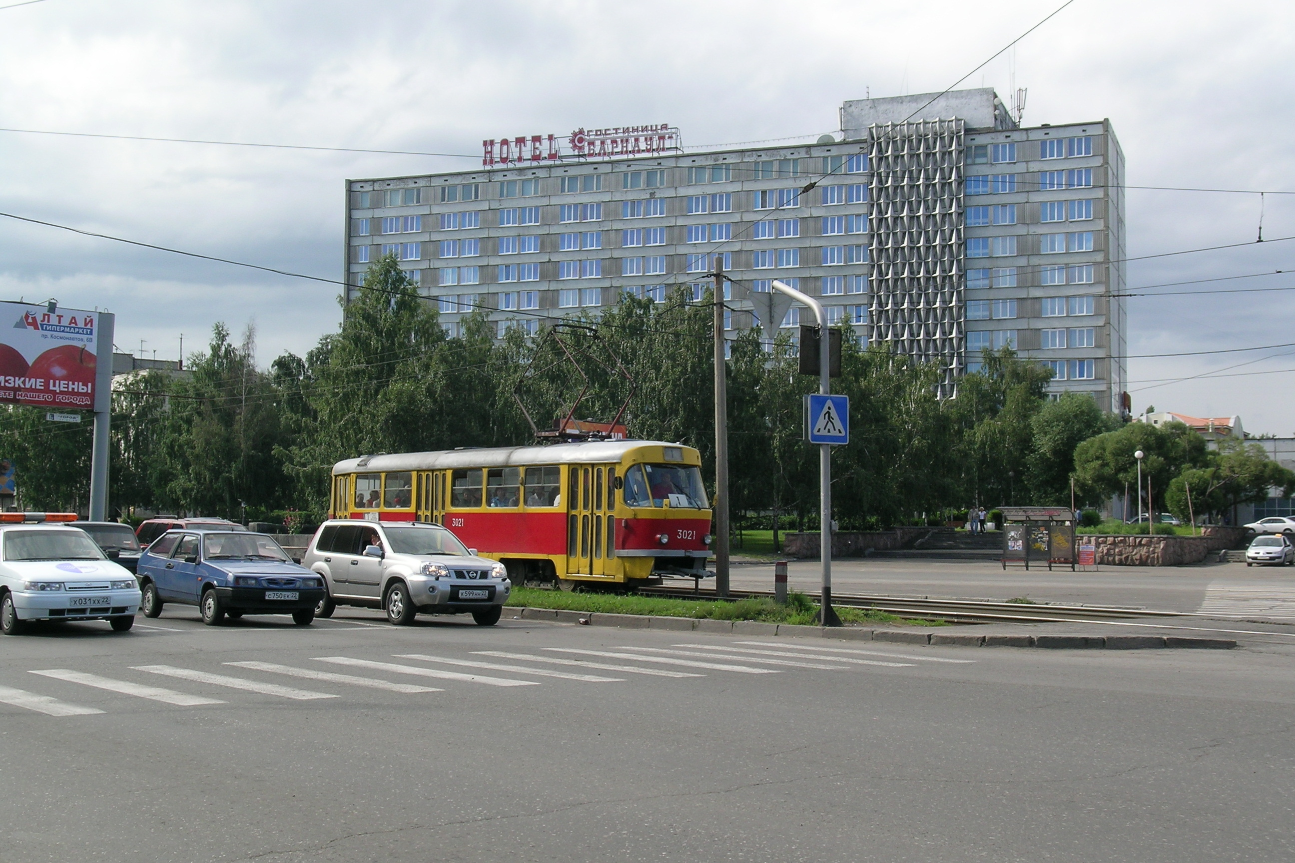 Barnaul Hotel (Barnaul, Altai Territory, Russia) - a photograph taken in summer 2006 Барнаул. Гостиница "Барнаул". Лето 2006.